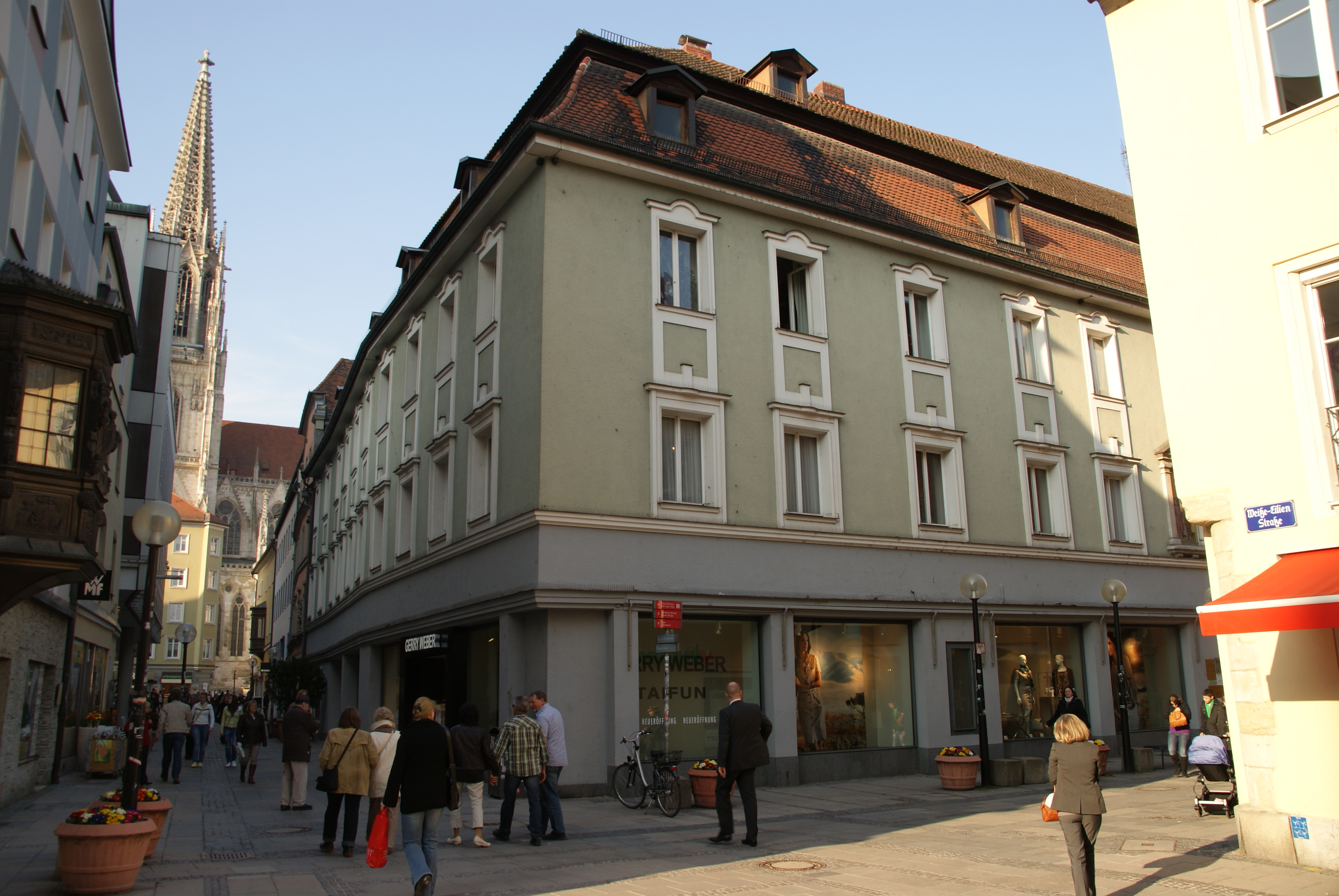 Dreigeschossiger Mansardwalmdachbau, 1850 zusammengefasst aus zwei Kanonikalhöfen der Alten Kapelle und dem Lerchenfelder Hof, 2. Hälfte 13. Jh., 17. und 18. Jh., Neurenaissance- Fassade, Dreikönigsrelief von 1478, Hof mit umlaufenden hölzernen Lauben, 17. Jh. This is a photograph of an architectural monument.